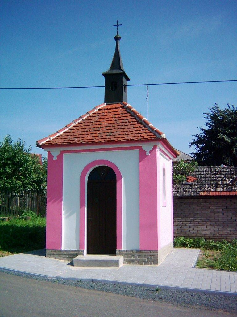 kaplička